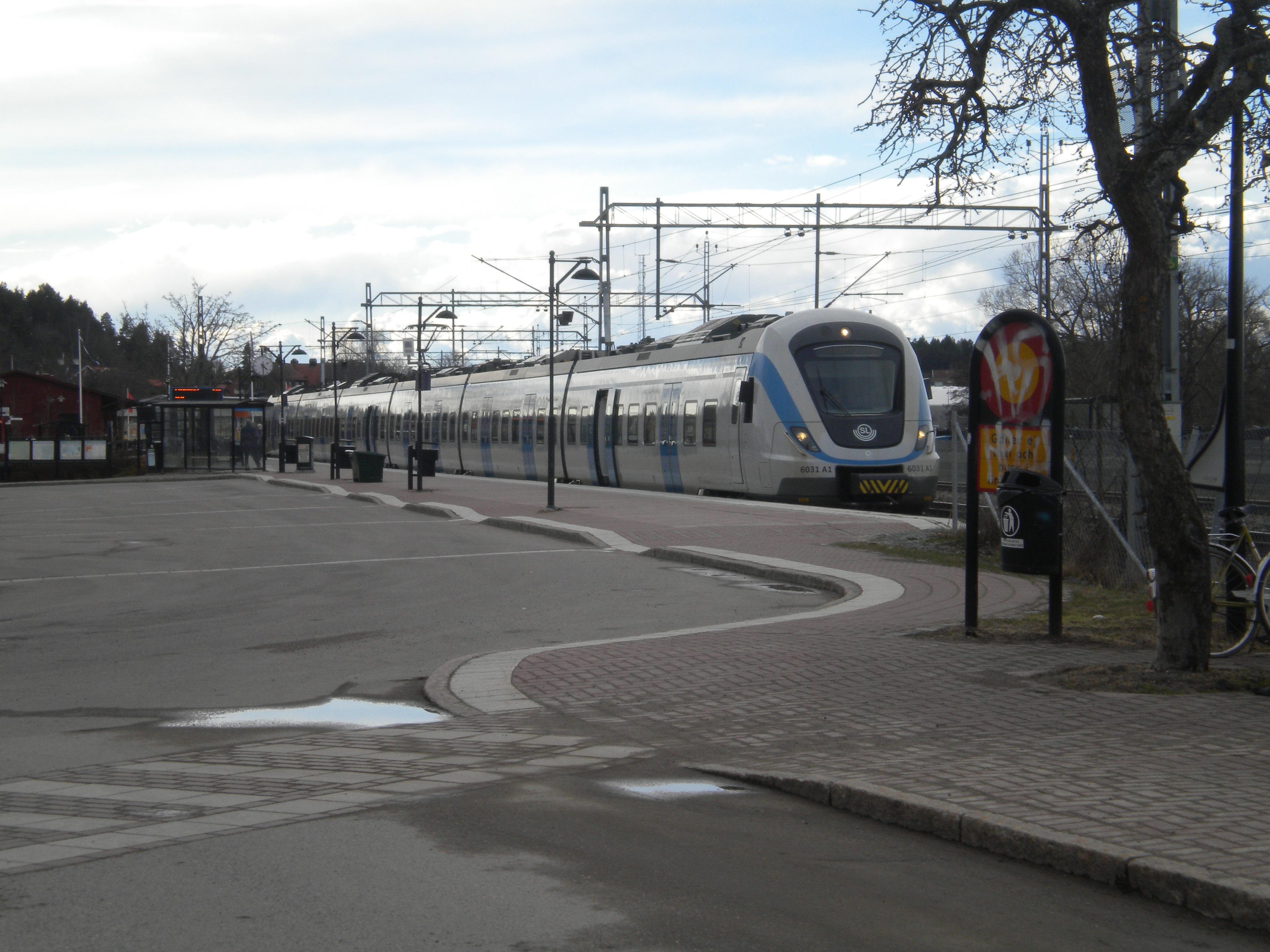 SL X60 6031 på Gnesta station, kortet taget mot väster.